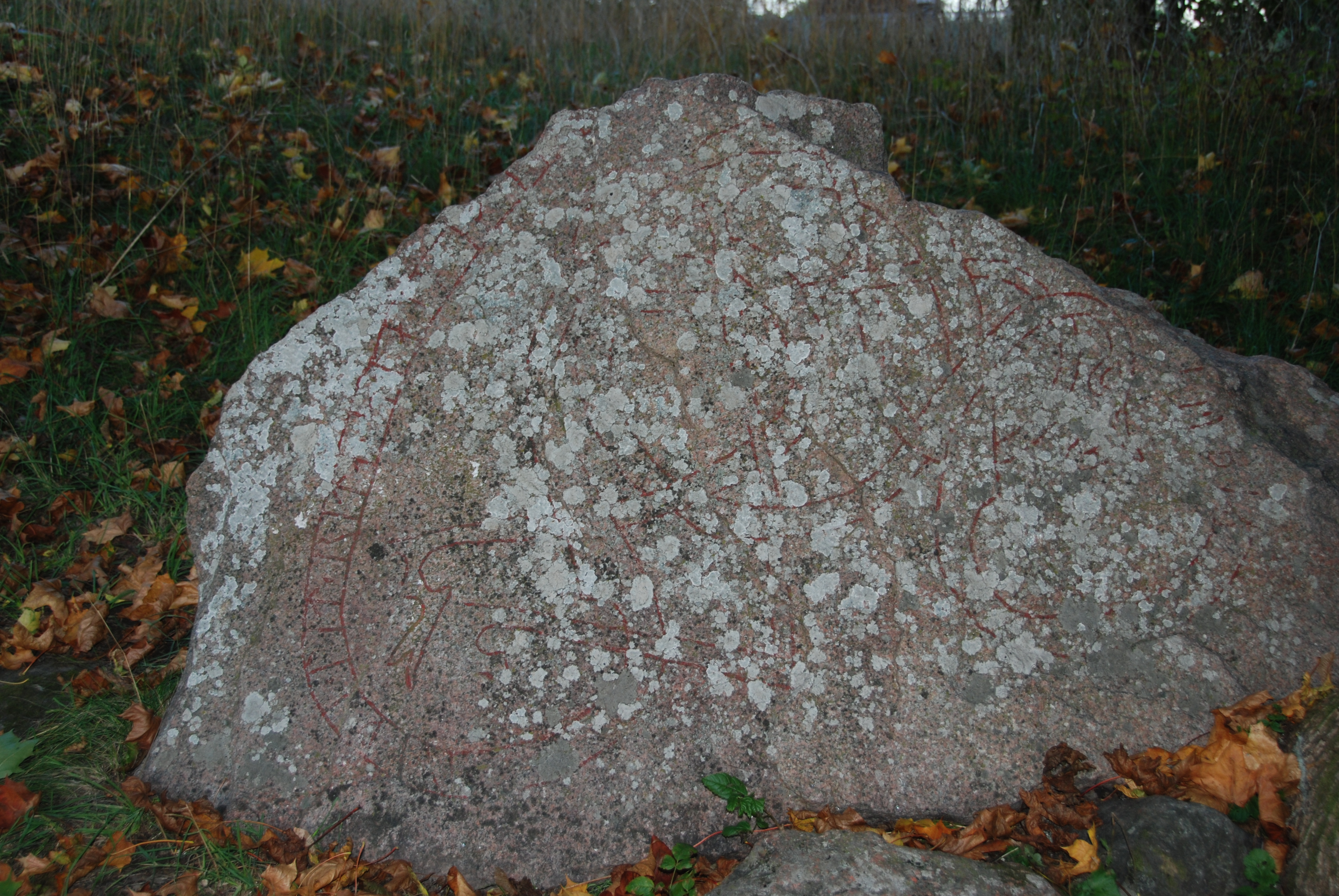 Uppsala 82:1